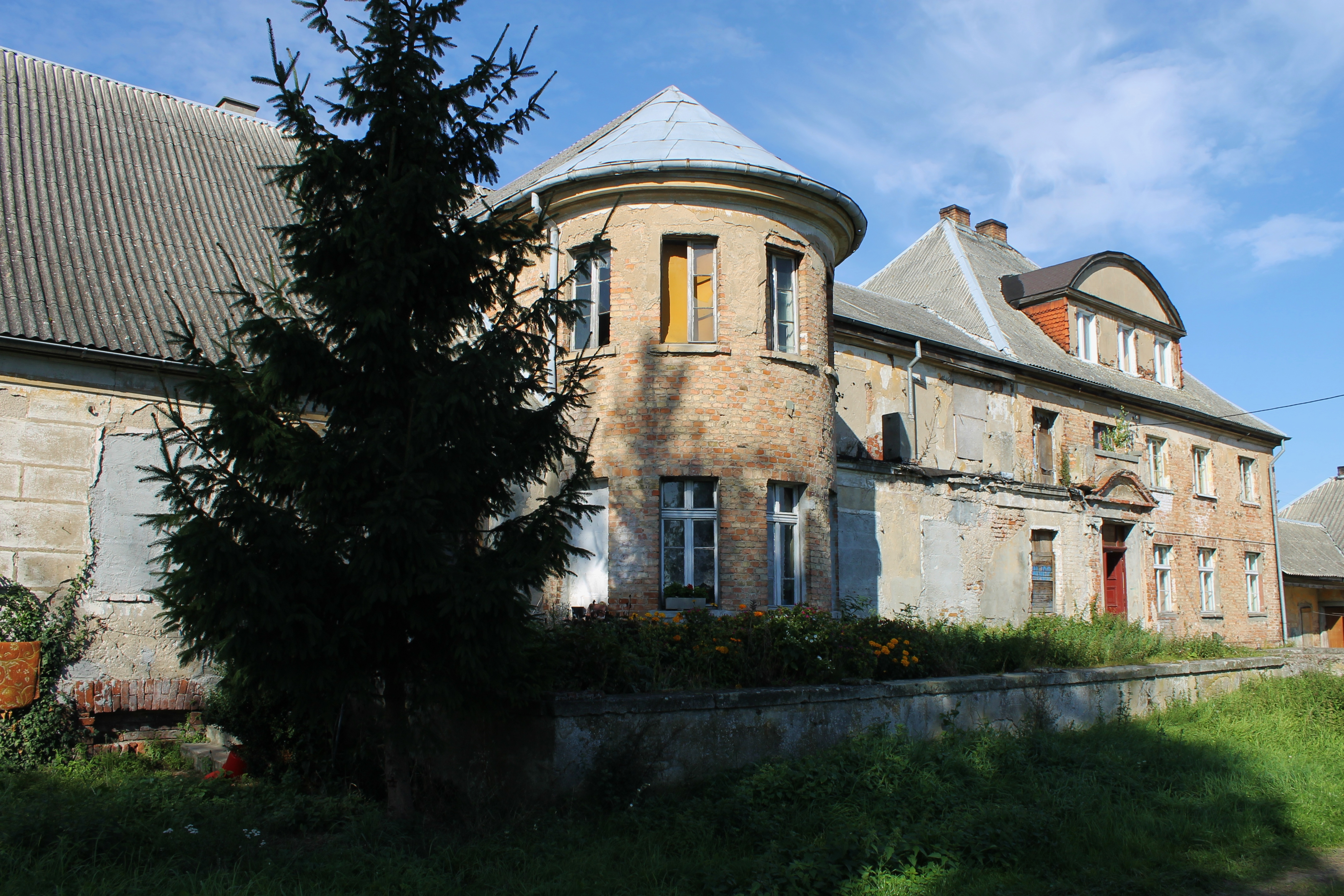 Rucewko - dwór, ok. 1861, kon. XIX